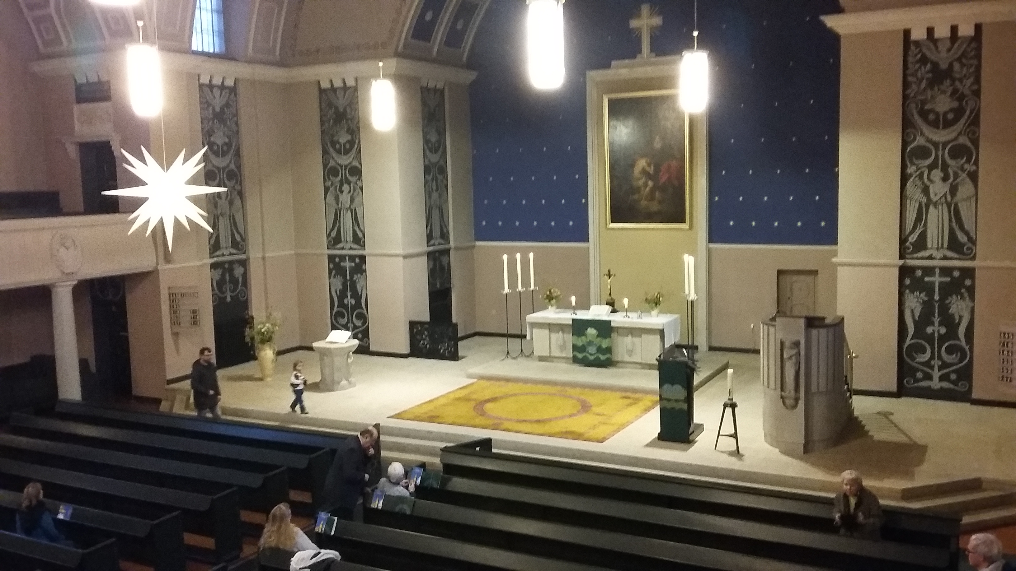 Hoffnungskirche Pankow Altar